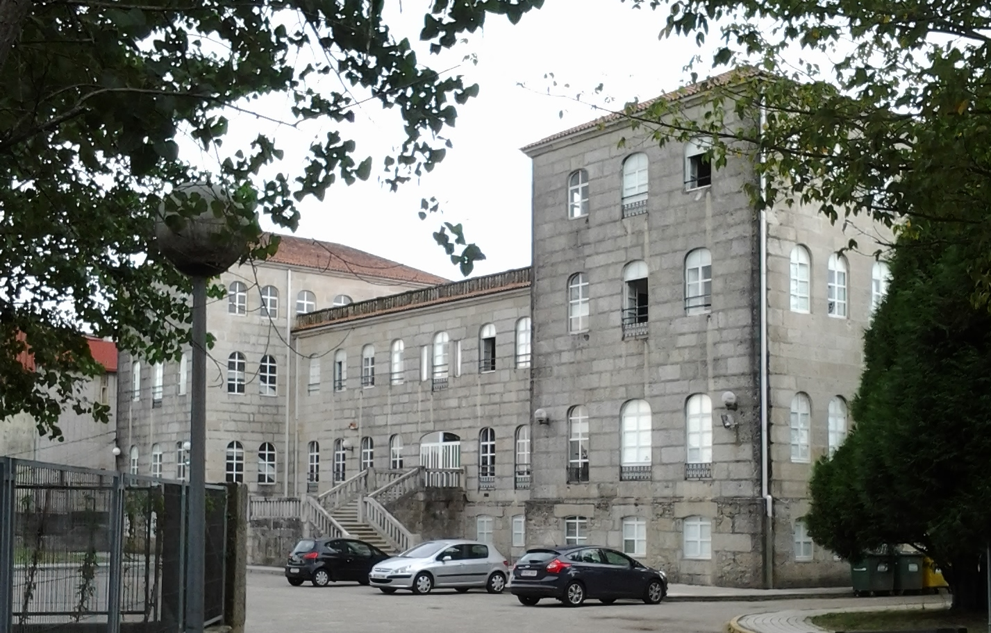 Instituto IES San Paio